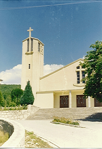 Župna crkva u Donjem i Gornjem Crncu posvećena Presvetom Srcu Isusovu